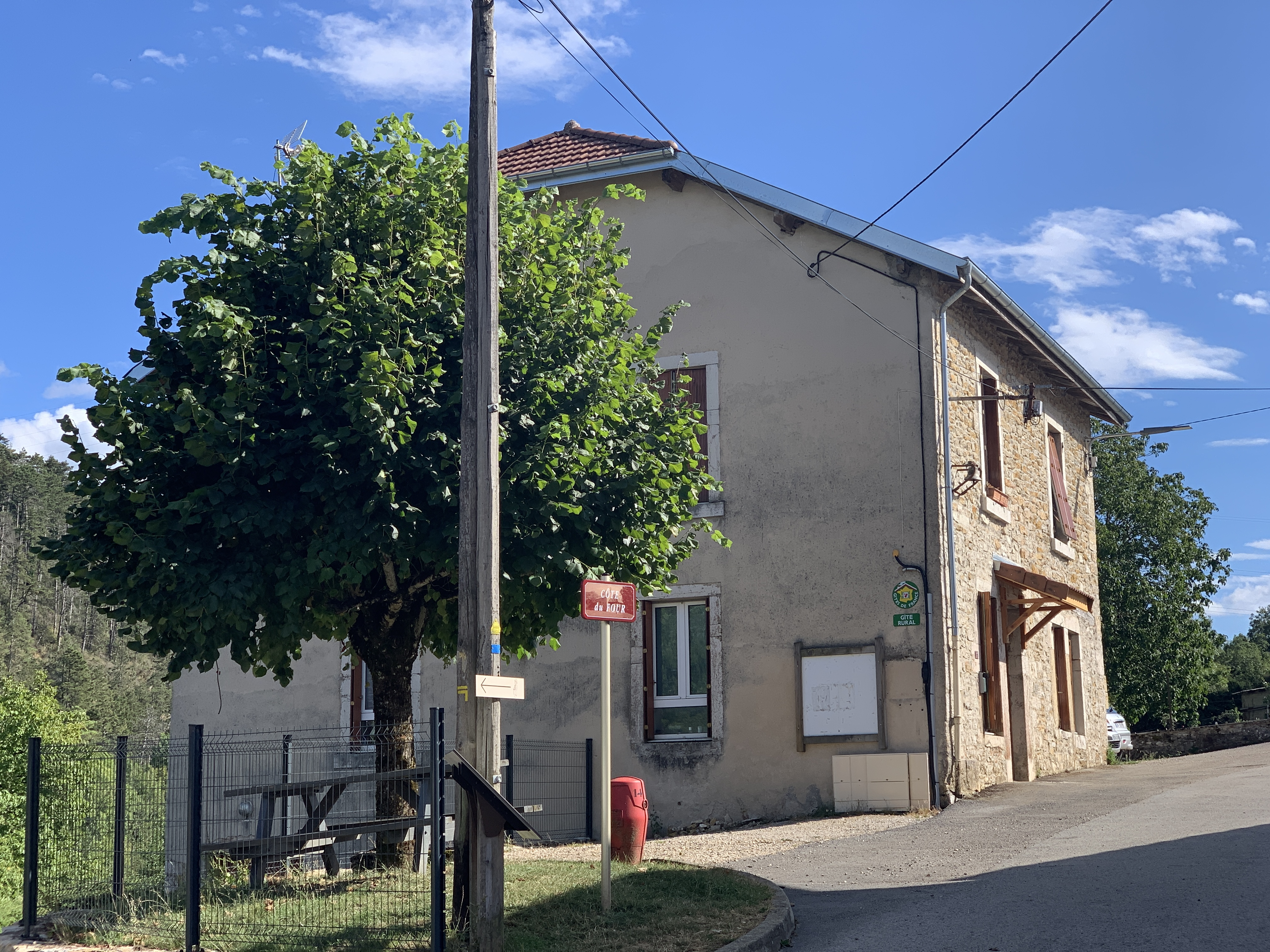 Ancienne mairie de Napt, Sonthonnax-la-Montagne.